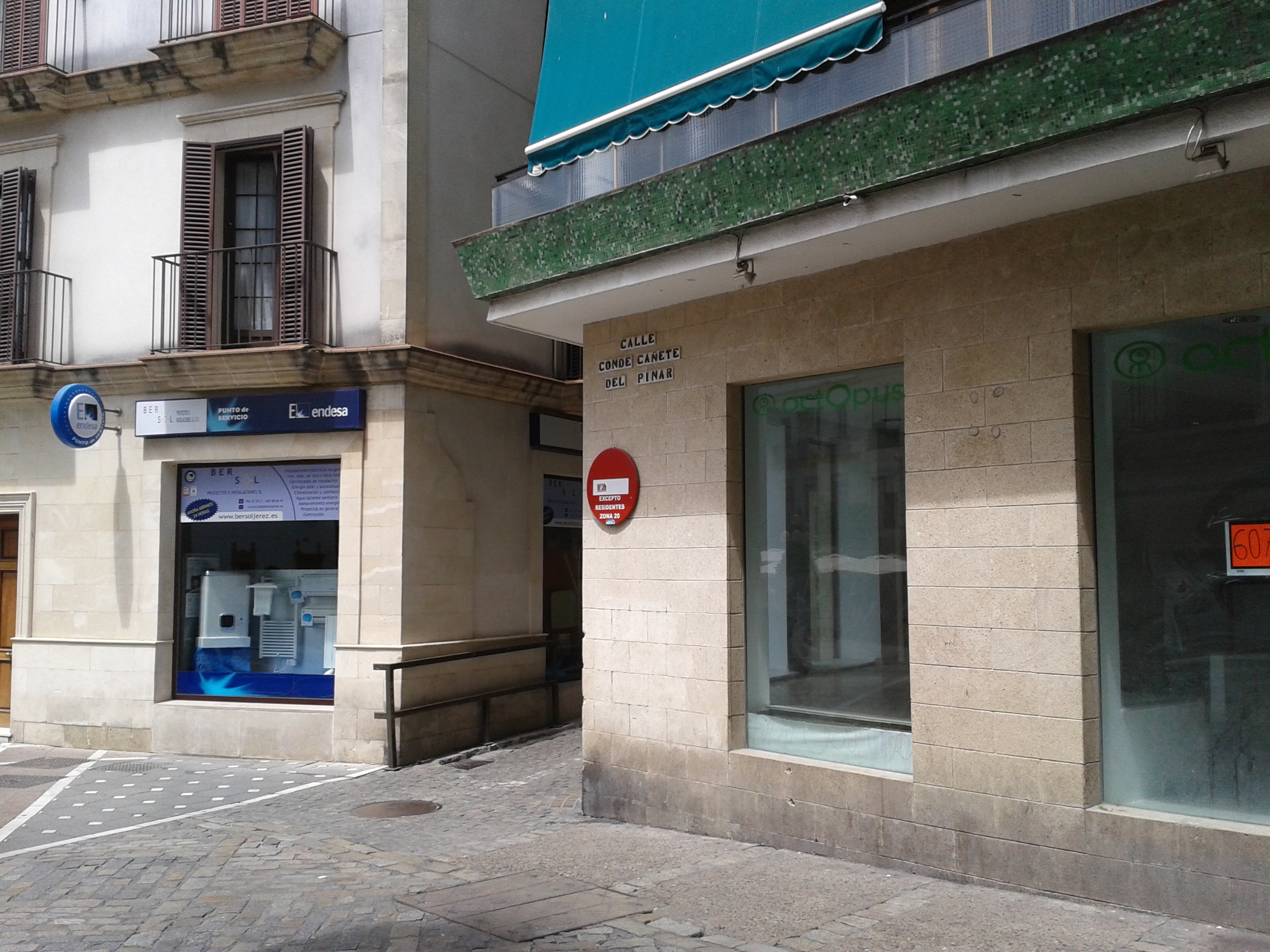 Calle en honor al conde de Cañete del Pinar, en Jerez de la Frontera.